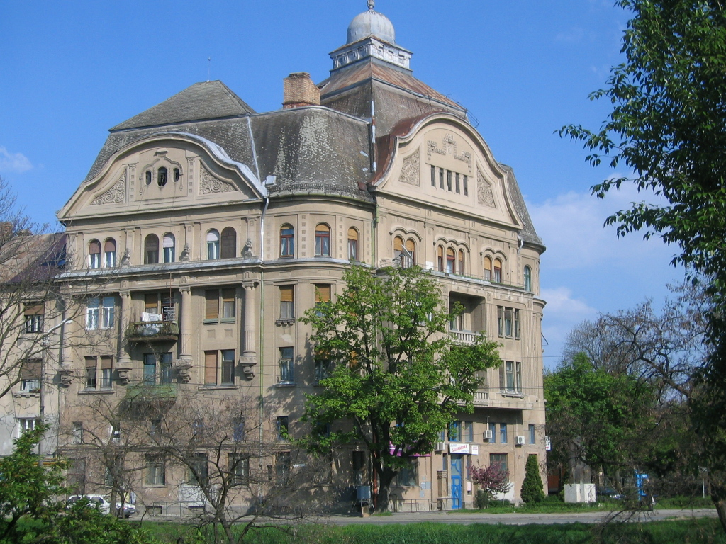 Baile Neptun, Timişoara, Romania